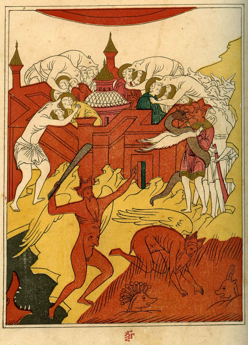 Миниатюра из книги «Апокалипсис трехтолковый». Московская старообрядческая книгопечатня 1909 г., с древлеписьменной рукописи первой половины XVII в. Глава 63 «О Гозе и Магозе»